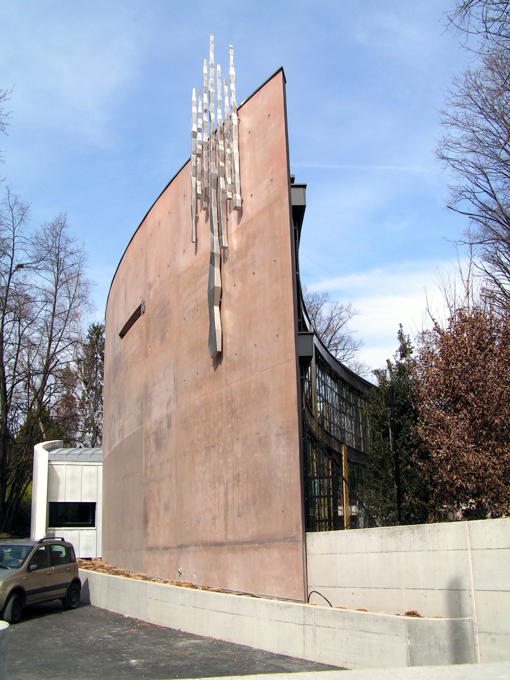 Synagogue de la communauté Israélite Libérale de Genève, 43 route de Chêne - CH-1208 Genève